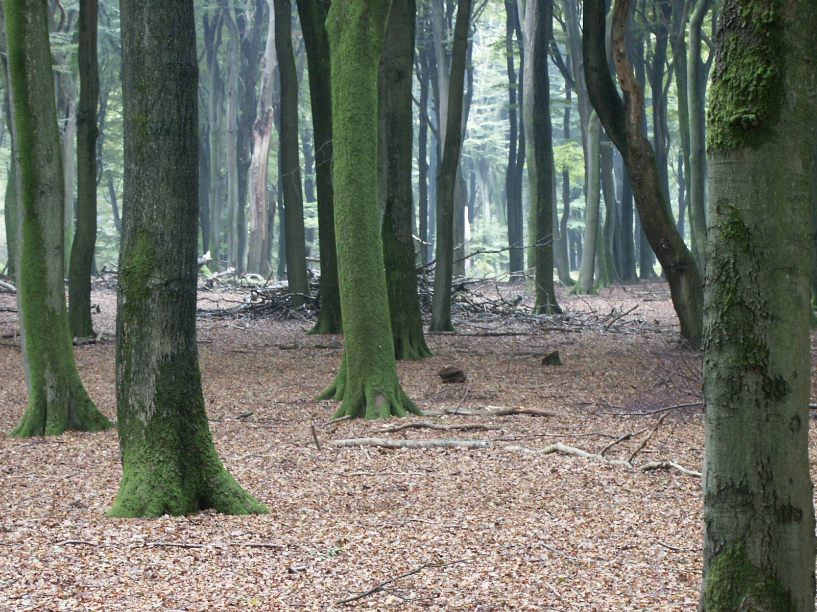 foto beukenbos tussen Gortel en Vierhouten. foto gemaakt door Wouter Baas, vrij te gebruiken